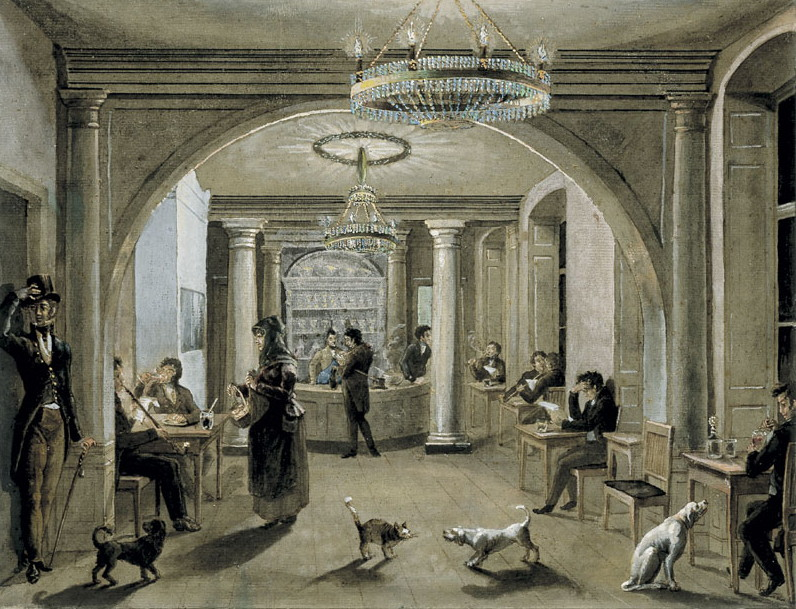 Bayards källare, Södermalmstorg 4 (kv. Överkikaren 1) i eldsljus.